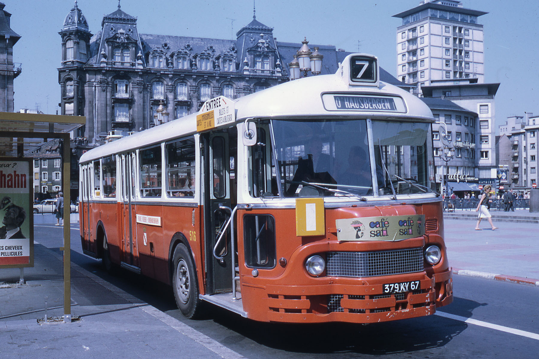 Autobus Chausson type APU de la CTS sur la ligne 8, place Kléber à Strasbourg, en 1969. Ce type de bus a été construit vers le milieu des années 1950. En arrière-plan l'ancienne « Maison Rouge » aujourd'hui disparue.